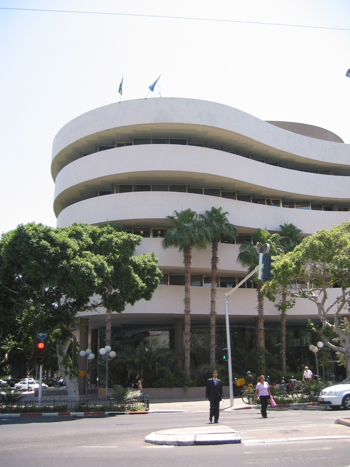 Asia House, Tel Aviv